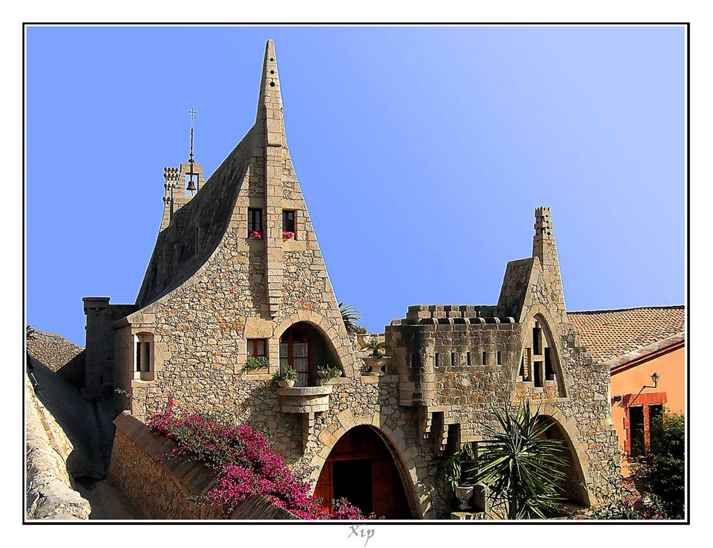 Diseñada por un discipulo de Gaudí, Francesc Berenguer i Mestres. Garraf (Barcelona) - Spain.